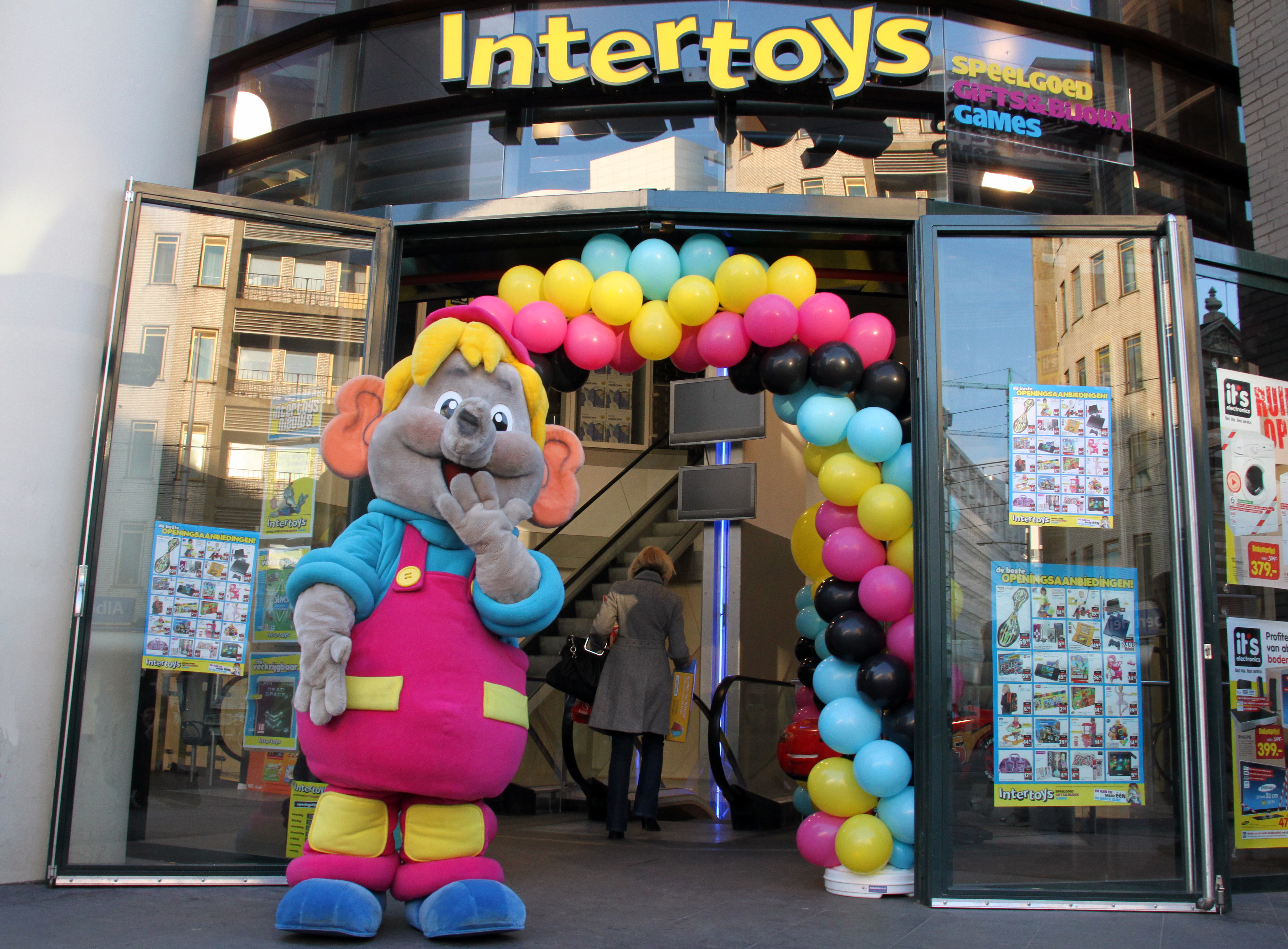 Opening van een Intertoys-winkel in Den Haag in 2011 met winkelsymbool Toy Toy